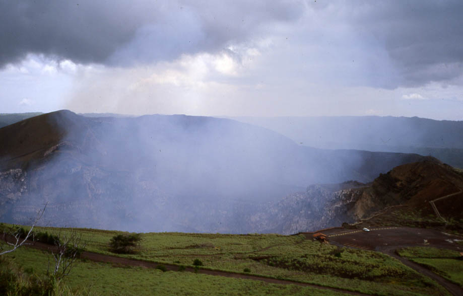 Cráter del Volcán Masaya. Nicaragua. 2002